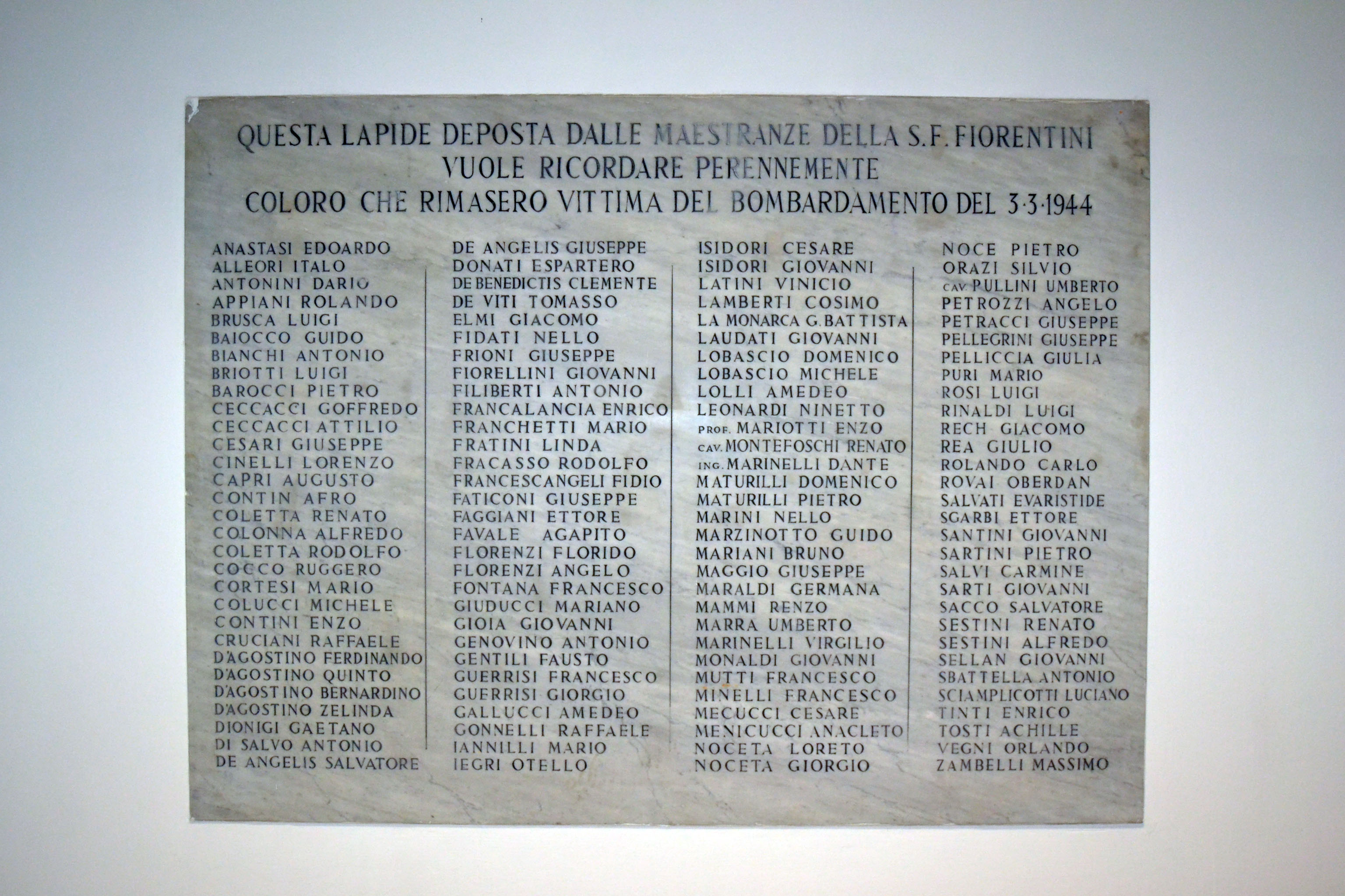 Lapide in memoria delle vittime del bombardamento degli alleati